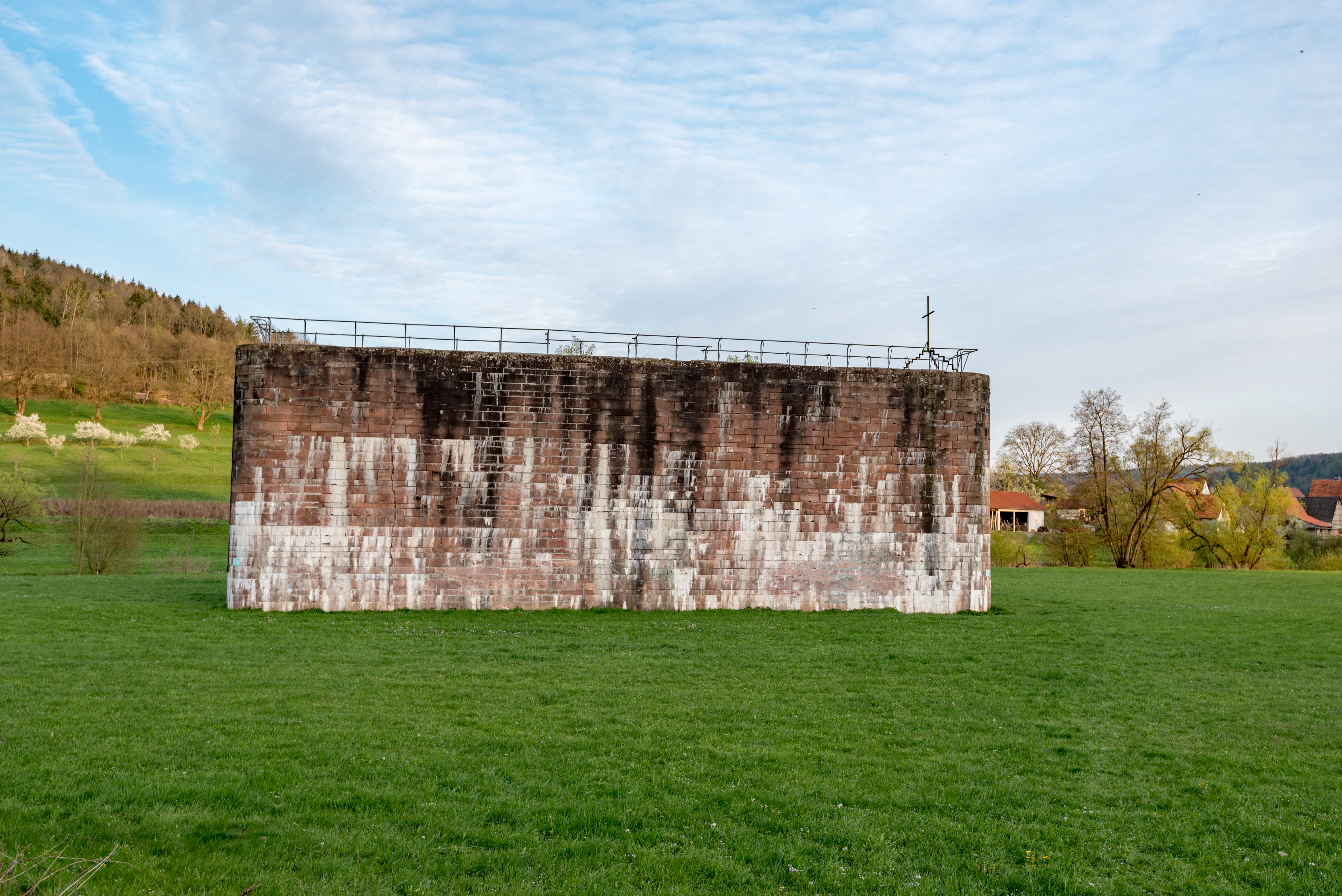 Gräfendorf, Pfeiler Strecke 46